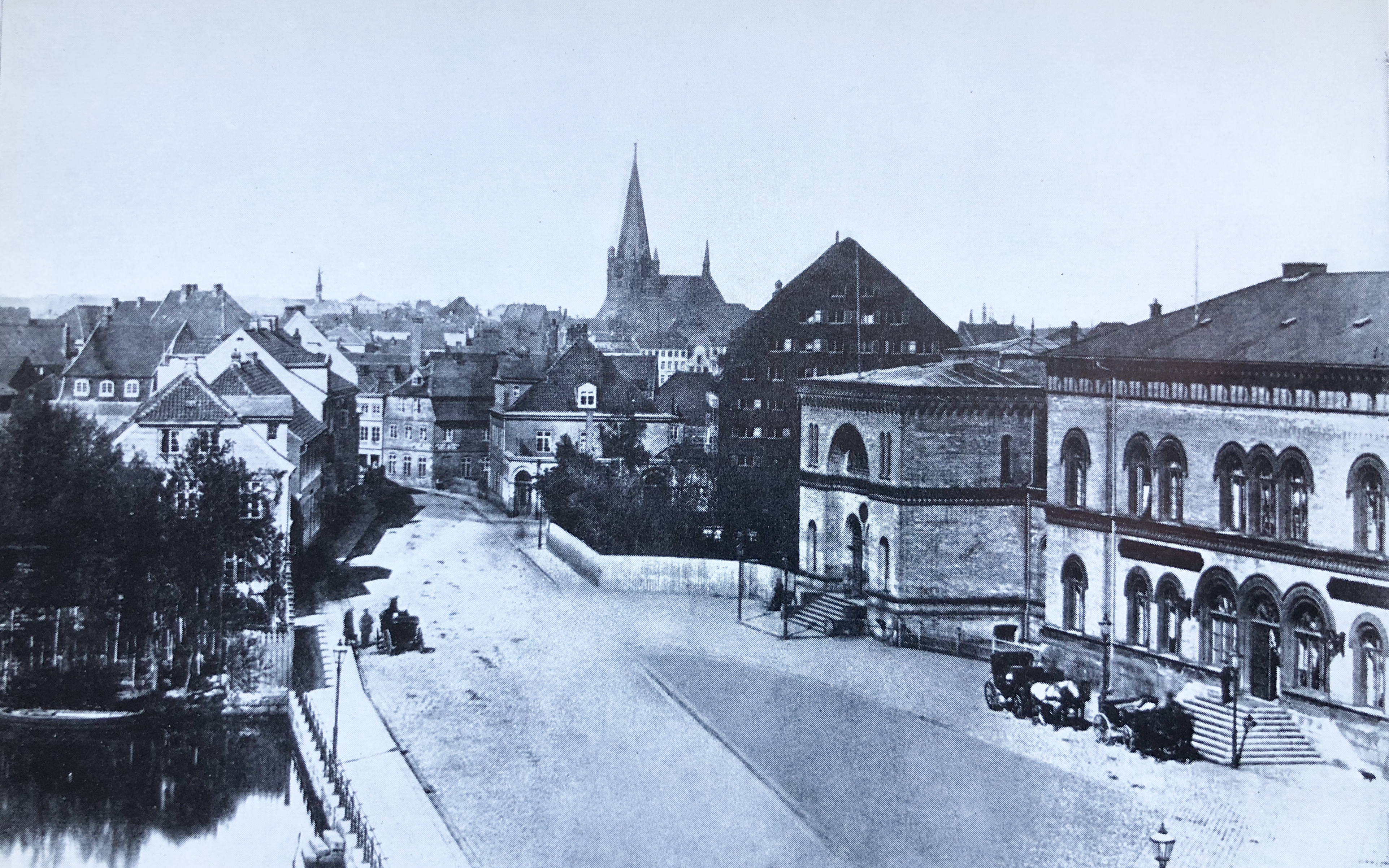 links der Ziegelteich (vor 1876 zugeschüttet), dahinter Muhls Hotel, am Horizont links der Dachreiter der Heiligengeistkirche (1242-1945) zwischen Falckstraße und Klosterkirchhof, in Bildmitte am Horizont die Nikolaikirche (1242-heute), westlich weiter vorn der Brauersche Speicher, zuvor Zuckerfabrik, davor die Jensenstraße (seit 1955 Gelände der Hauptpost/Stresemannplatz 1), rechts davon der Bahnhof (1843-1905) Straßenzug in Bildmitte heißt Klinke nach einem Türklinken-ähnlich herunterlassbaren Schlagbaum, der bis 1932 vor Muhls Hotel an der Schevenbrücke lag. Die damalige Straße Klinke liegt seit 1955 unter Holstenplatz und Andreas-Gayk-Straße.